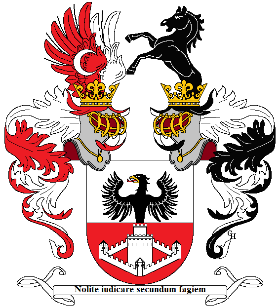 Wappen des österreichisch-ungarischen Diplomaten Alfred Rappaport (1868–1946), verliehen anlässlich seiner Erhebung in den österreichischen Ritterstand mit dem Prädikat "von Arbengau" 1916. Zeichnung von Gerd Hruška ( Für weitere Informationen zu dieser Standeserhebung siehe (